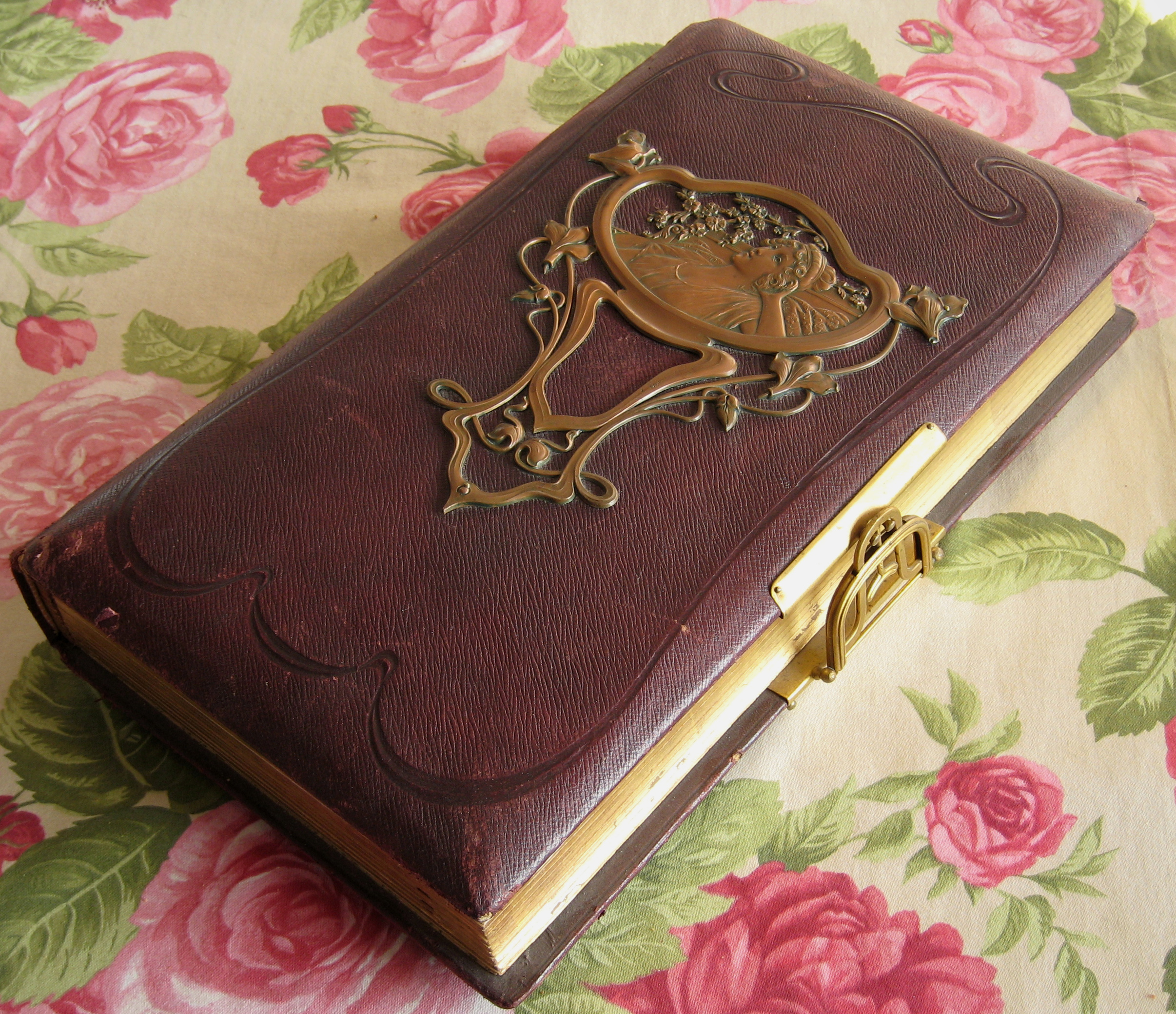 Sogenanntes Phootgraphie-Album aus der Zeit um 1900